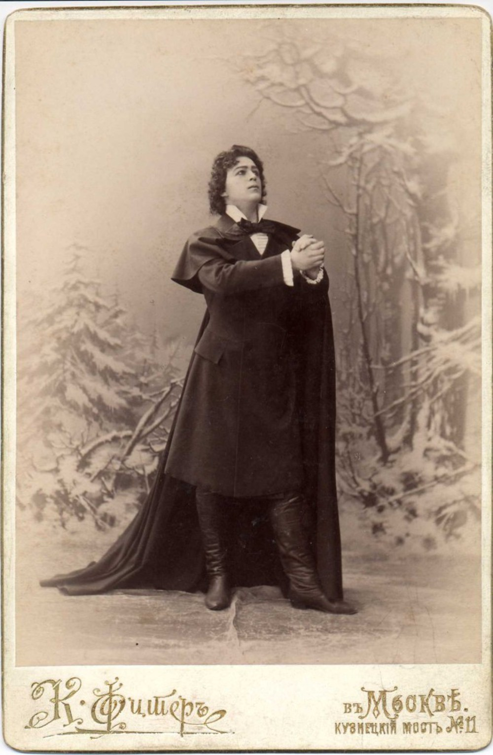 Леонид Собинов в роли Ленского фото